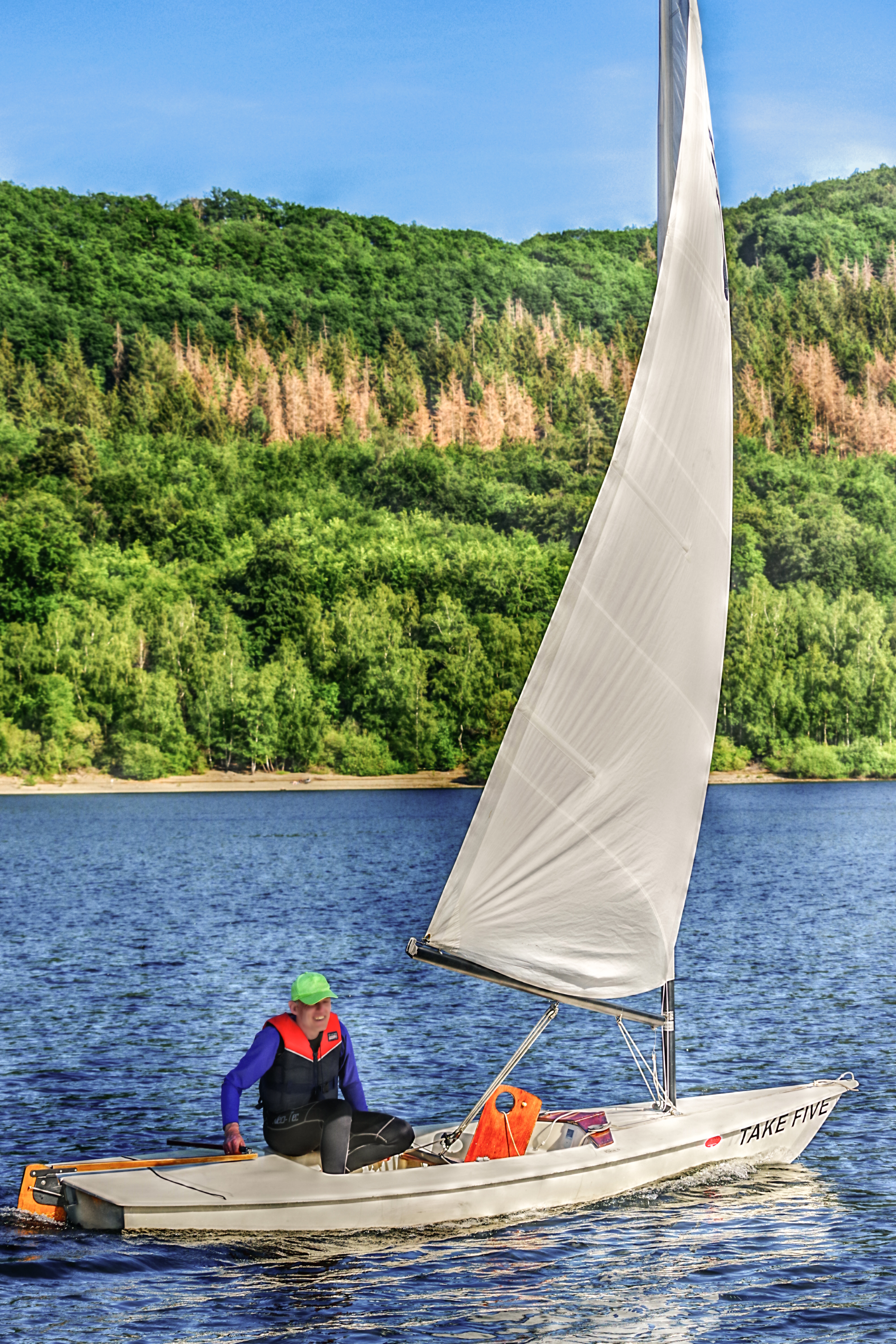 Segelboot Force 5